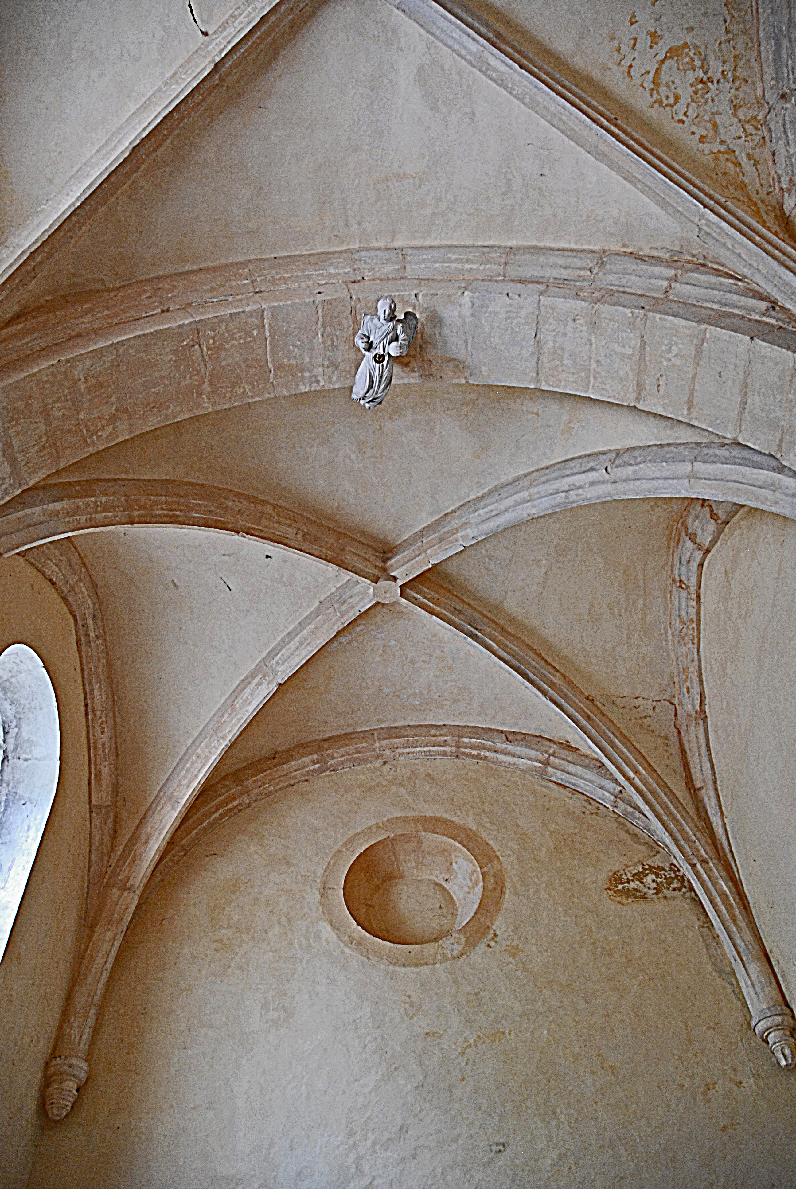 Châtillon-s-S, Heiligkreuzkap. Gewölbe